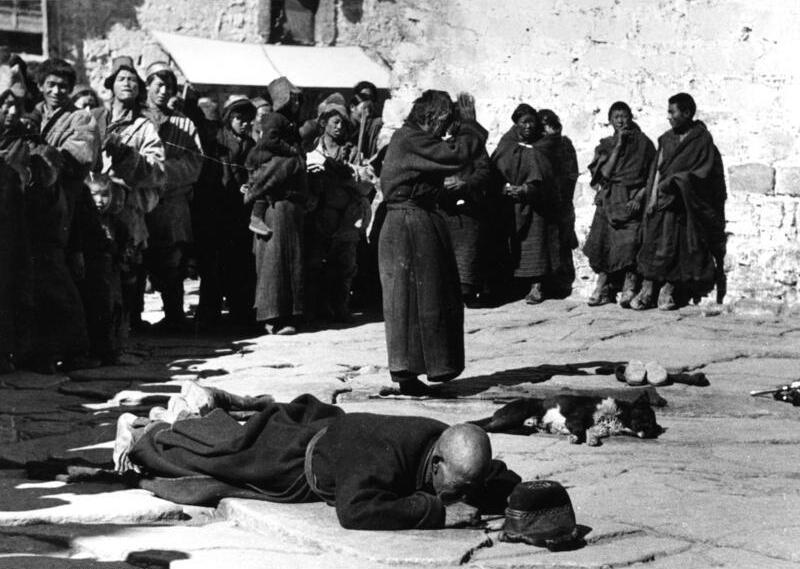 Lhasa, Bauchrutscher